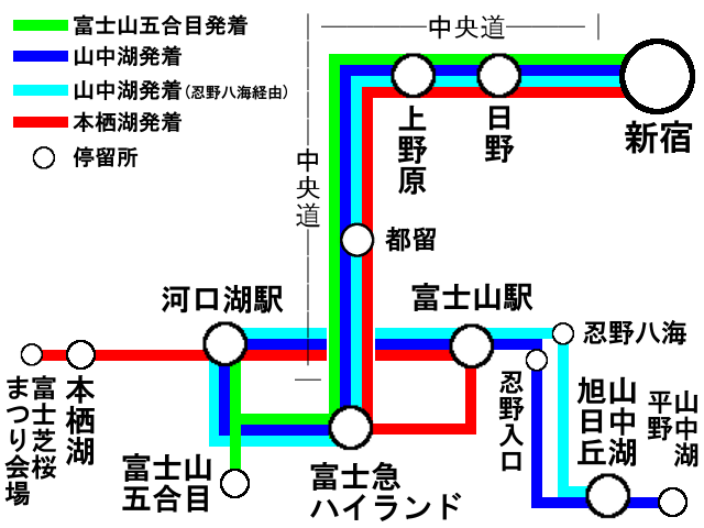 中央高速バス新宿 - 富士五湖線、新宿 - 富士山五合目線路線図